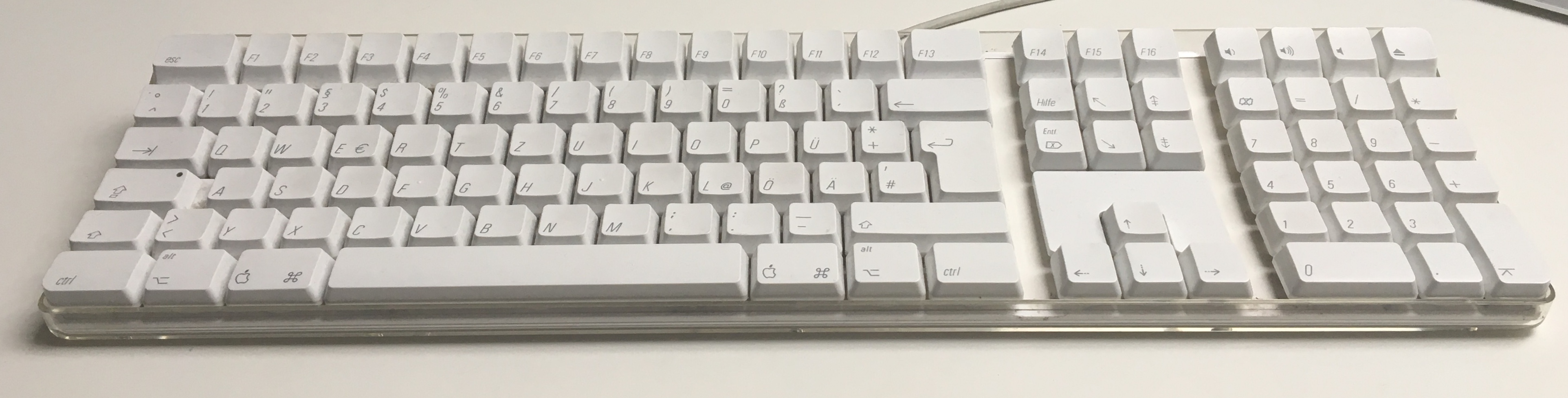 Apple Pro Keyboard, originally shipped with an iMac G4